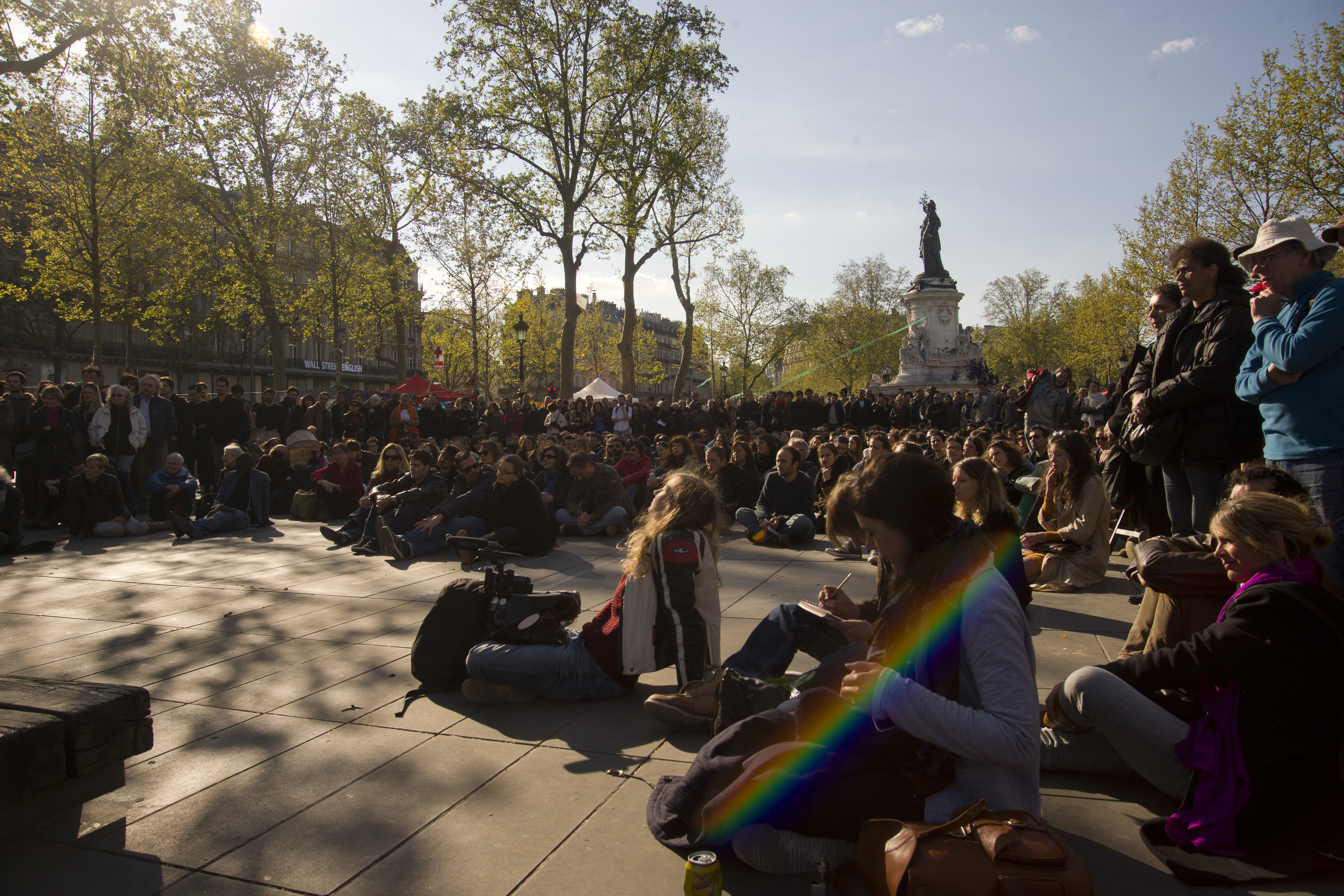 Rassemblement "Nuit Debout" à Paris le 2 mars.